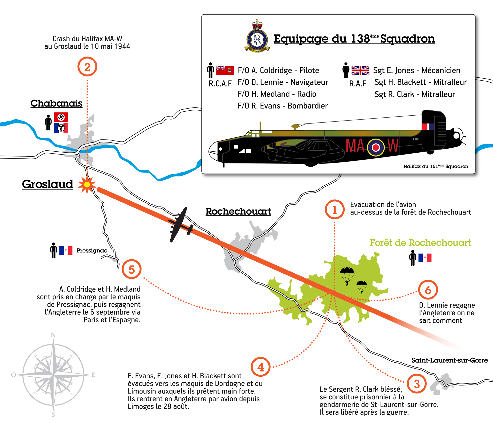 Crash du Halifax MA-W LL183 du 161ème squadron près de Chabanais le 10 mai 1944